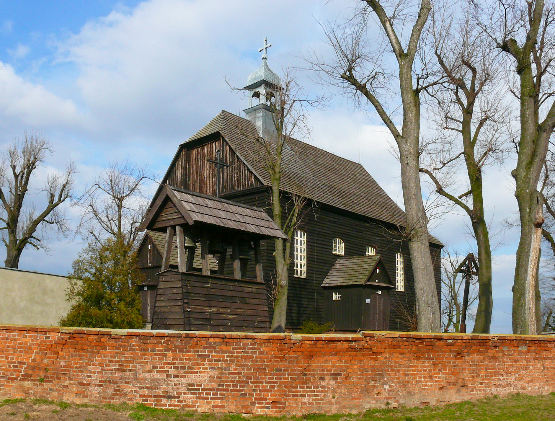 Panienka 5 - kościół drewniany pw. Najświętszego Imienia Jezus z 1787 r. (zabytek nr KS.Z.-II-1/15/49)